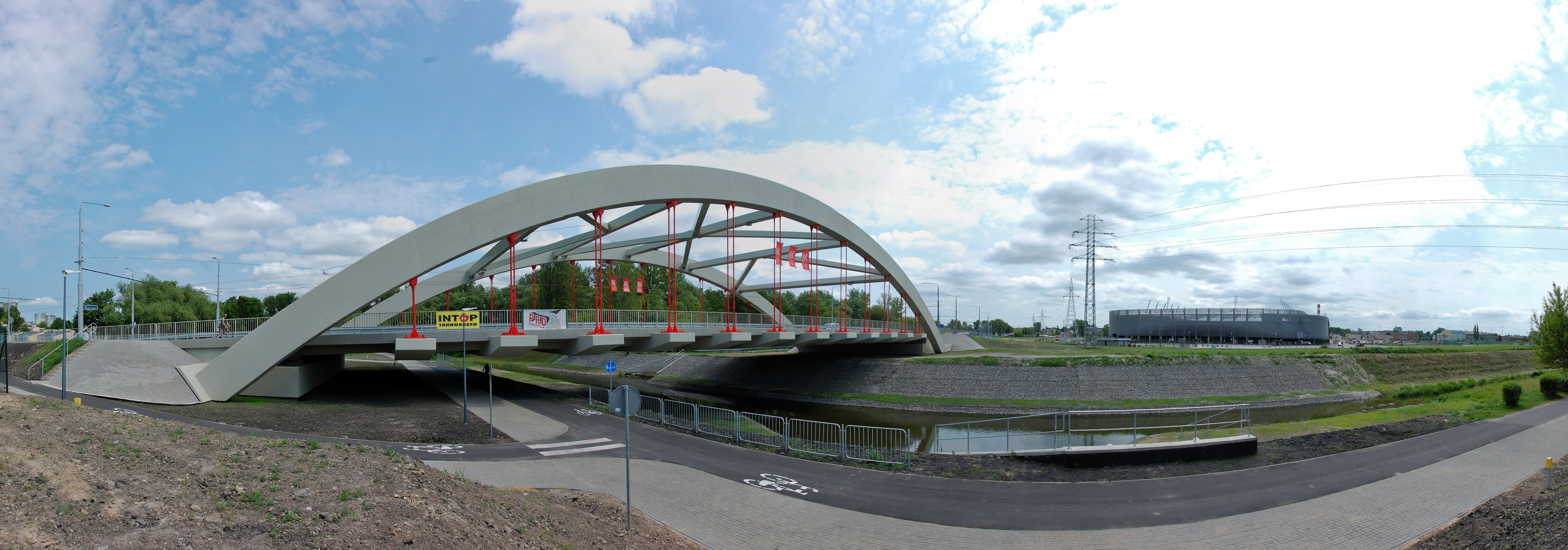 Most 700-lecia Lublina